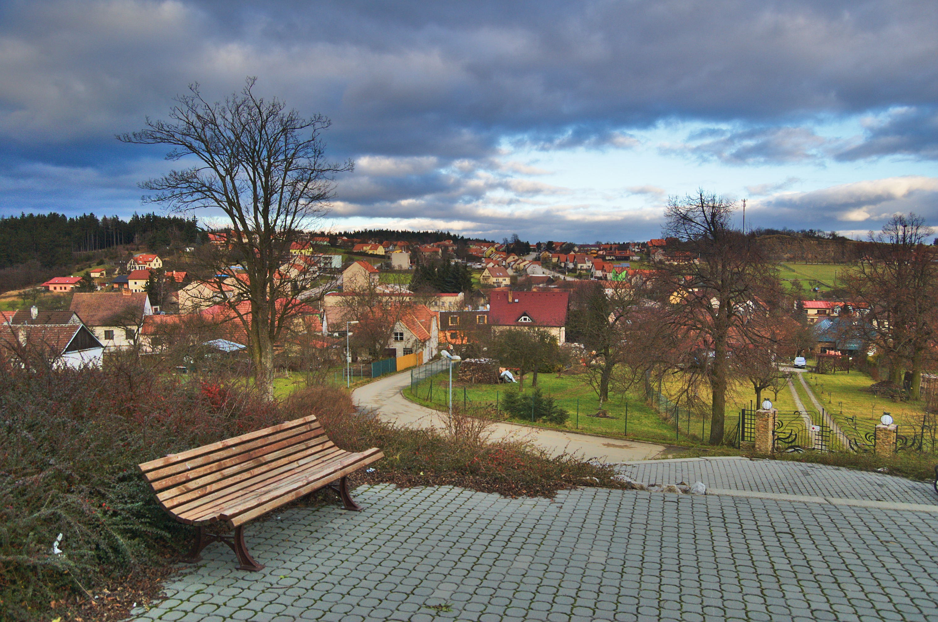 Pohled na obec od kaple svatého Václava a Anežky České, Šošůvka, okres Blansko